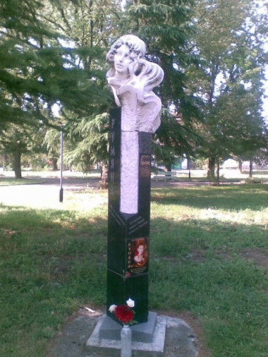 Паметник на певицата Румяна в родния и град Камено